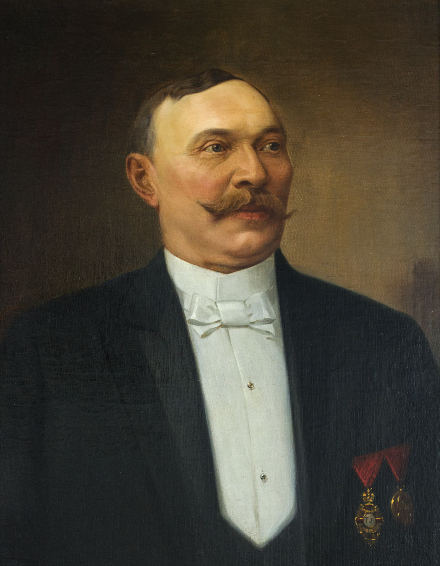 Obraz nechal namalovat starosta Fenkl v roce 1901 u příležitosti udělení rytířského kříže Řádu Františka Josefa za zásluhy o rozvoj monarchie. Zobrazuje starostu Fenkla na vrcholu sil - bylo mu padesát pět let - krátce poté, co odešel po jedenácti letech z funkce starosty. Obraz visel v rodinné vile chodovského starosty až do roku 1945, kdy jej členové rodiny ve chvíli, kdy museli Chodov a Československo opustit, na rychlo vyřízli z rámu a jako jednu z mála rodinných památek jej odvezli do Německa. Srolované plátno opatrovala rodina dlouhých sedmdesát pět let, než se jej potomci Karla Fenkla se rozhodli věnovat městu Chodovu, kam podle nich patří.